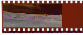 negativo de imagem tirada com a Widelux